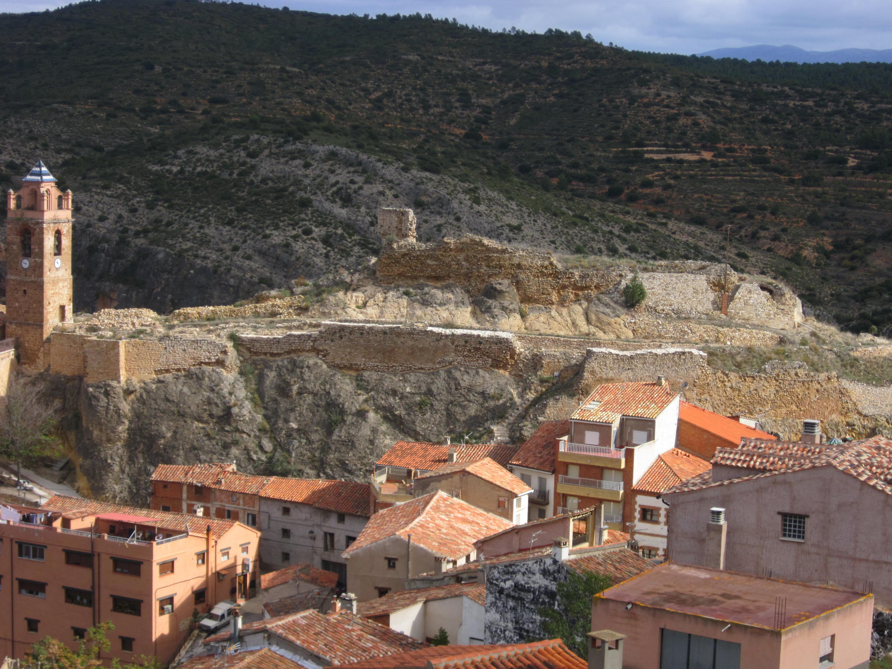 Vista parcial del Castillo de Castielfabib (sin la Torre del Homenaje-Iglesia que se sitúa a la izquierda)